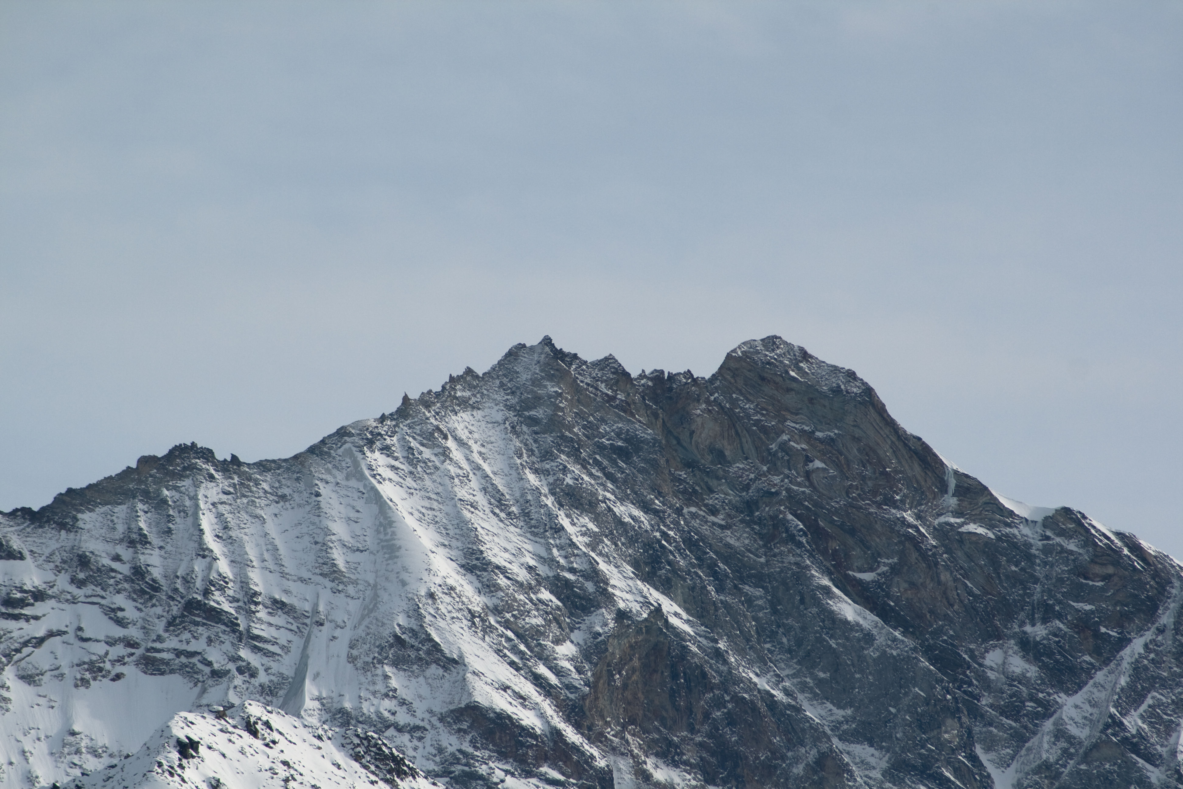 Le Schalihorn dans les Alpes valaisannes, vu depuis les pentes de la Corne de Sorebois.